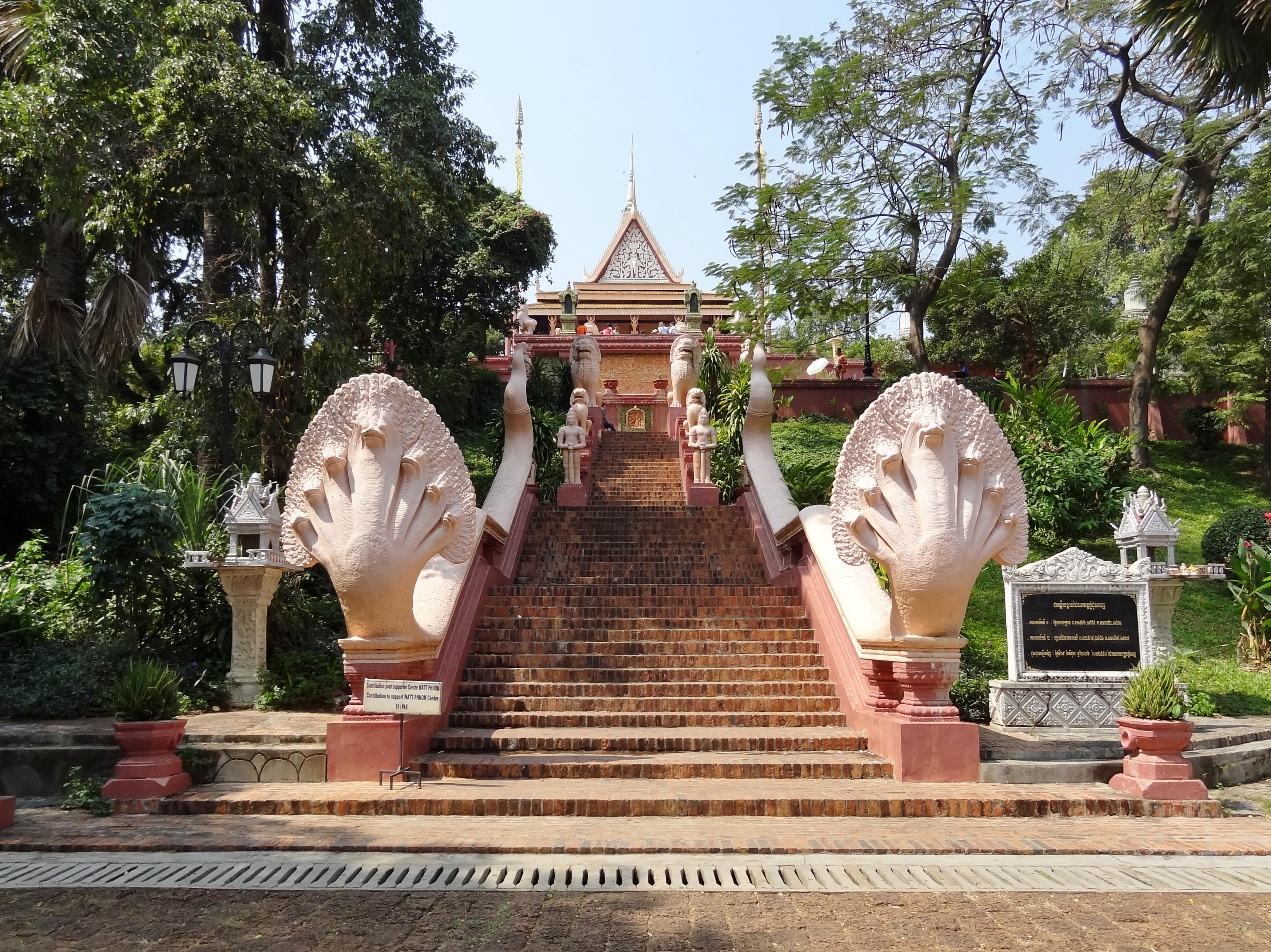 Wat Phnom Daun Penh in Phnom Penh, Kambodscha